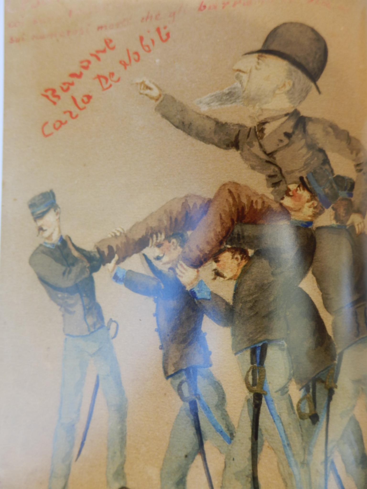 Caricature de Carlo De Nobili réalisée par un anonyme signant Cencio et datant d'entre 1889 et 1902, conservée au Circolo di Catanzaro.